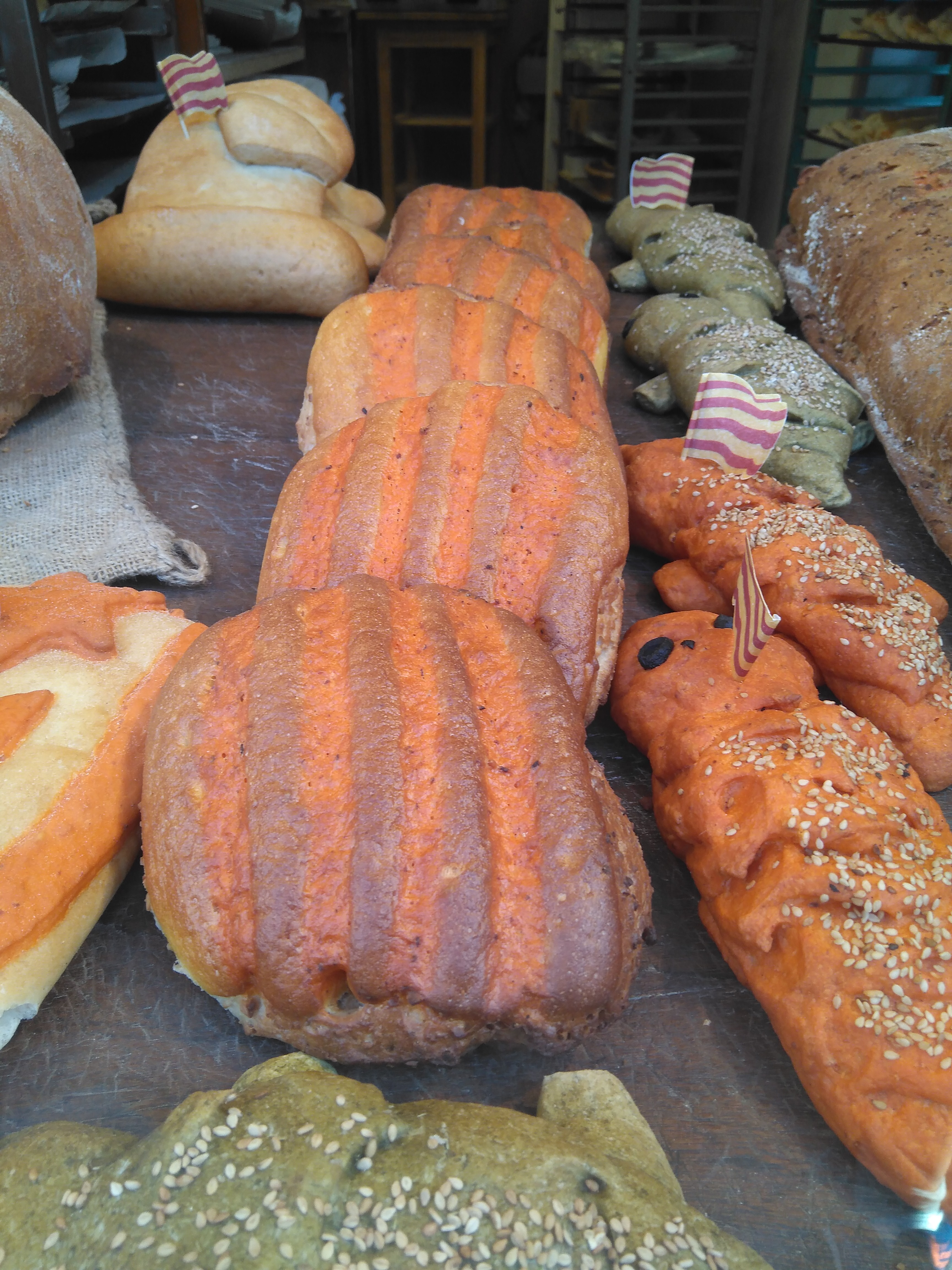 Pa de Sant Jordi (centre) al Forn Baltà de Barcelona.